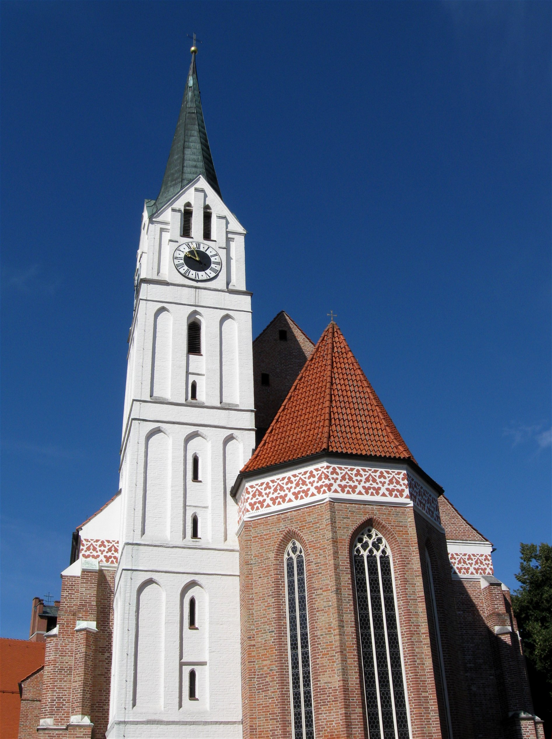 Nikolastraße 43; Katholische Pfarrkirche St. Nikola, sog. "Alt-St.-Nikola", dreischiffige spätgotische Hallenkirche, fertiggestellt 1481, mit älterem Turm und einschiffigem Chor von 1389/90 (dendro. dat.); mit Ausstattung